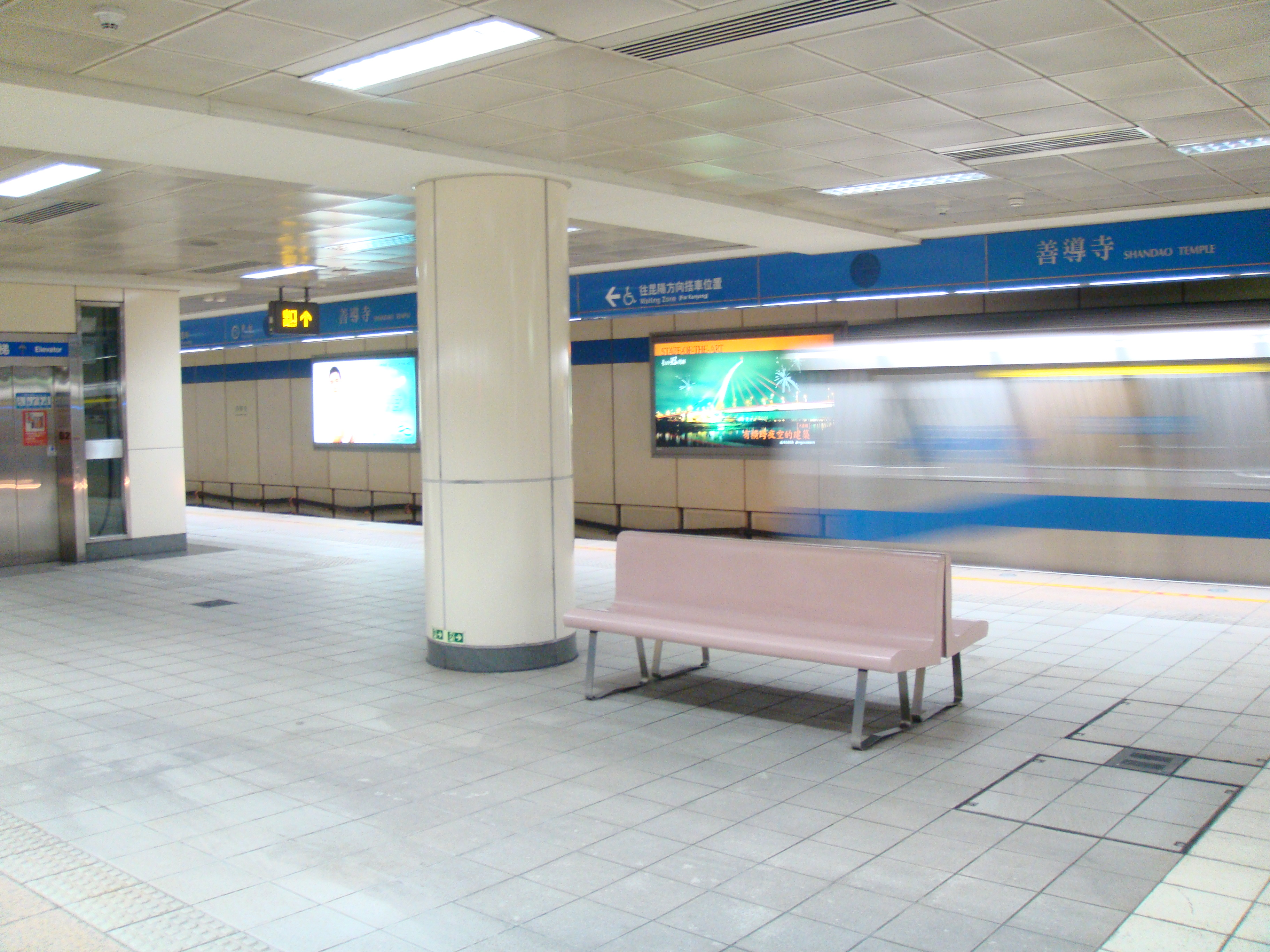 Shandao Temple Station, Nangang Line, Taipei Metro, Taiwan.